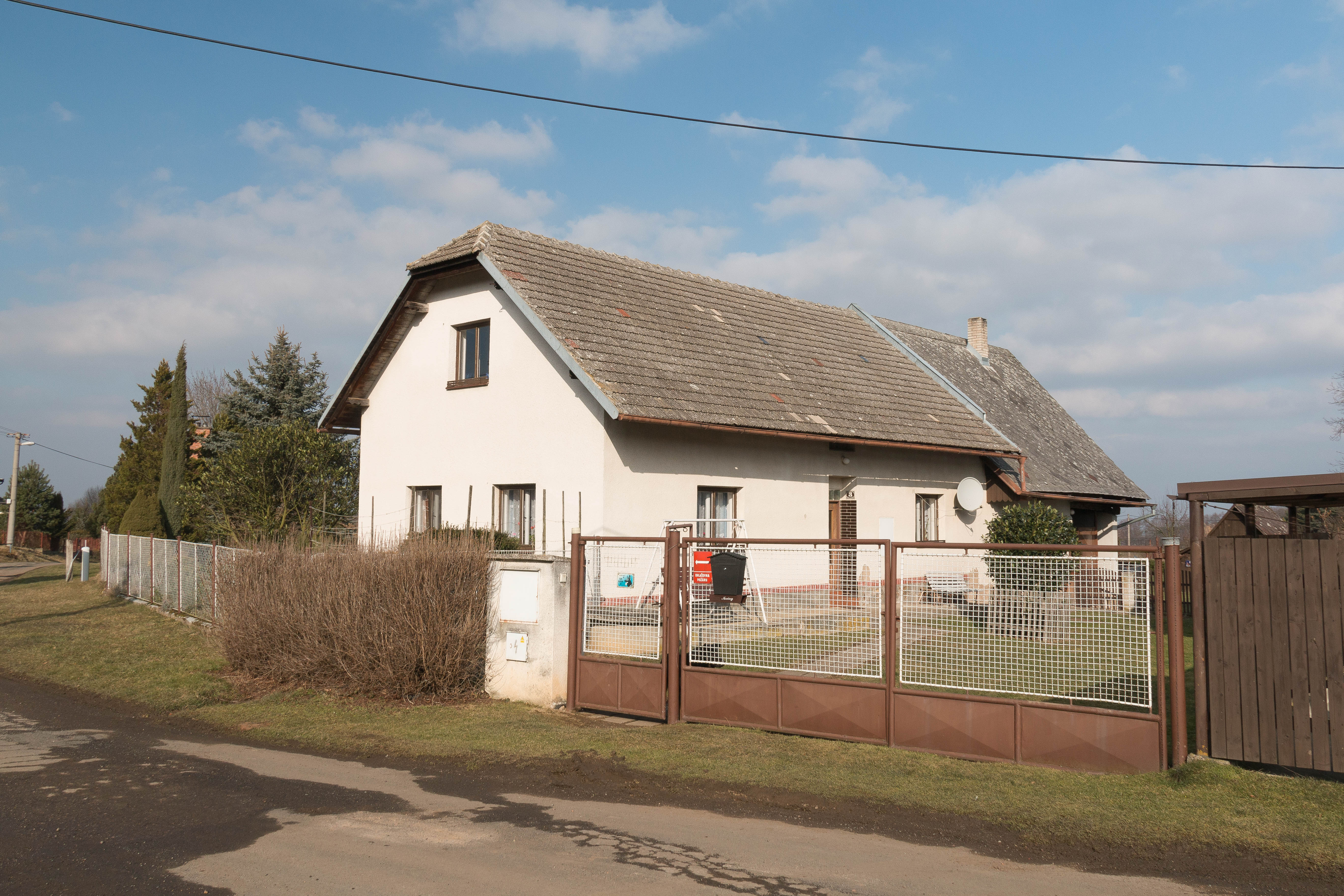 Radochlín čp. 3